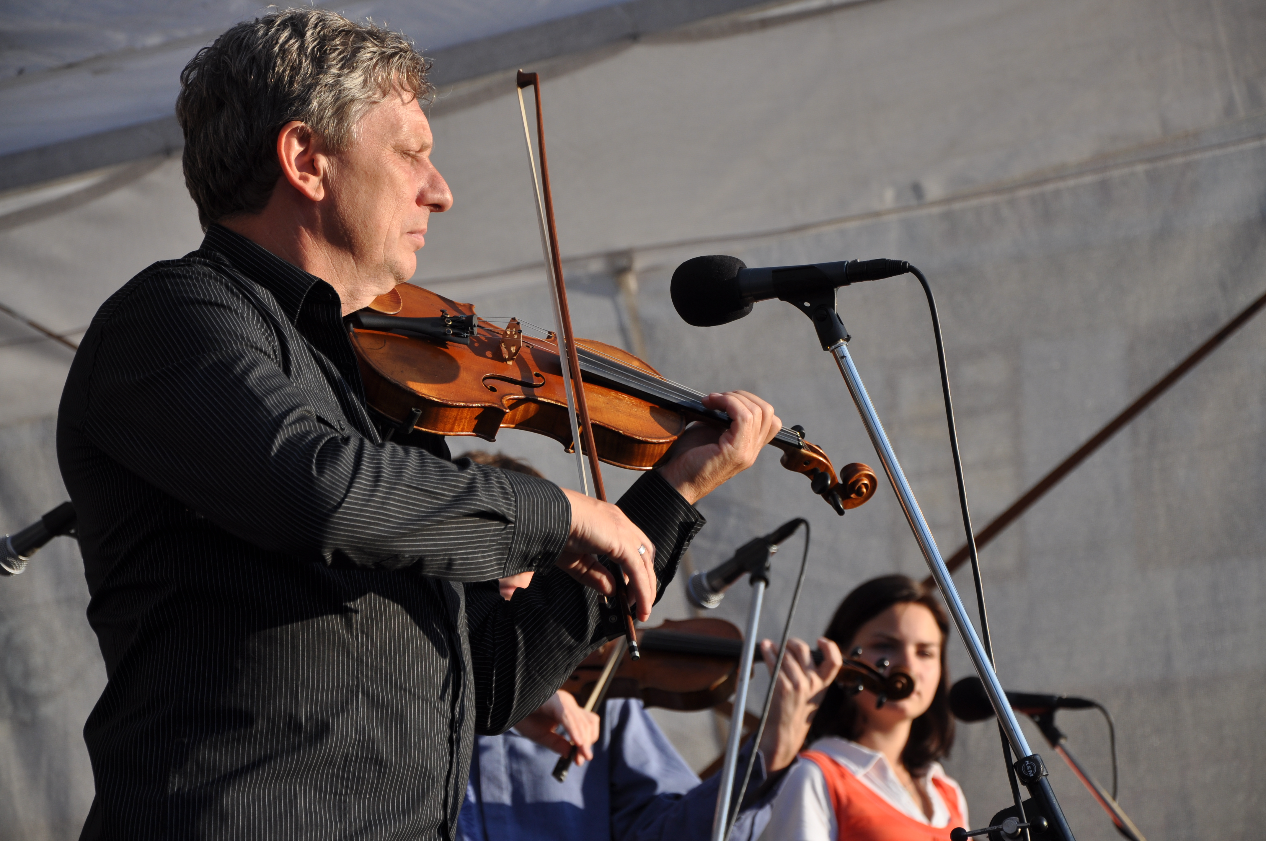 Skupina Hradišťan v Chrudimi na náměstí.